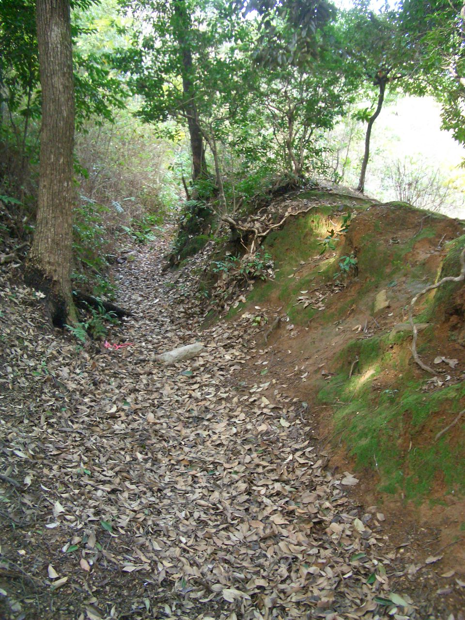 船岡山城横堀の土塁